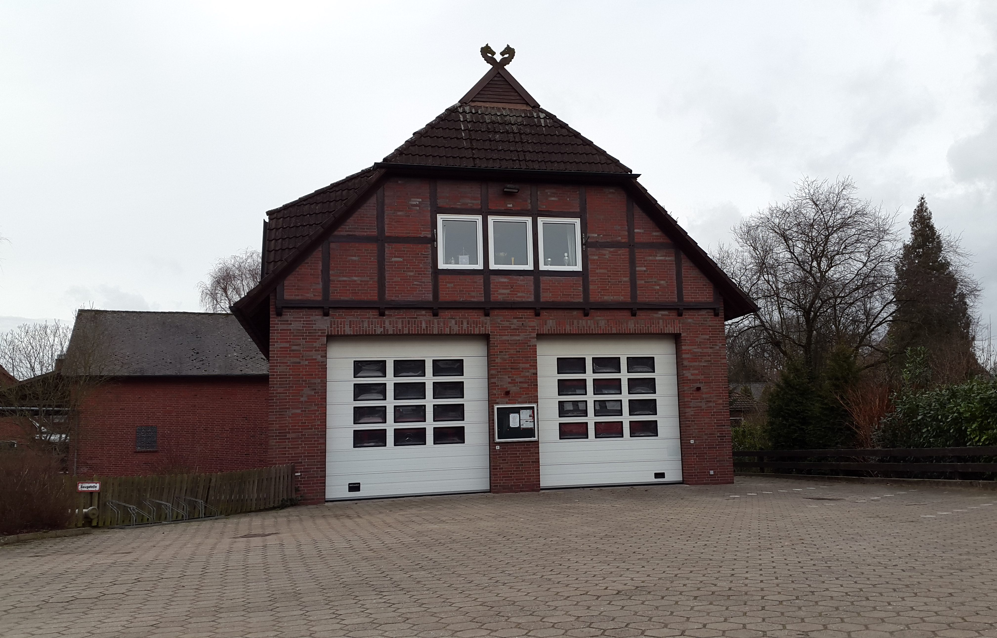 Feuerwehrgebäude in Ohlendorf (Seevetal)